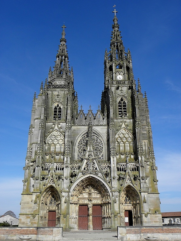 Façade occidentale de la basilique Notre-Dame à L'Épine (51).